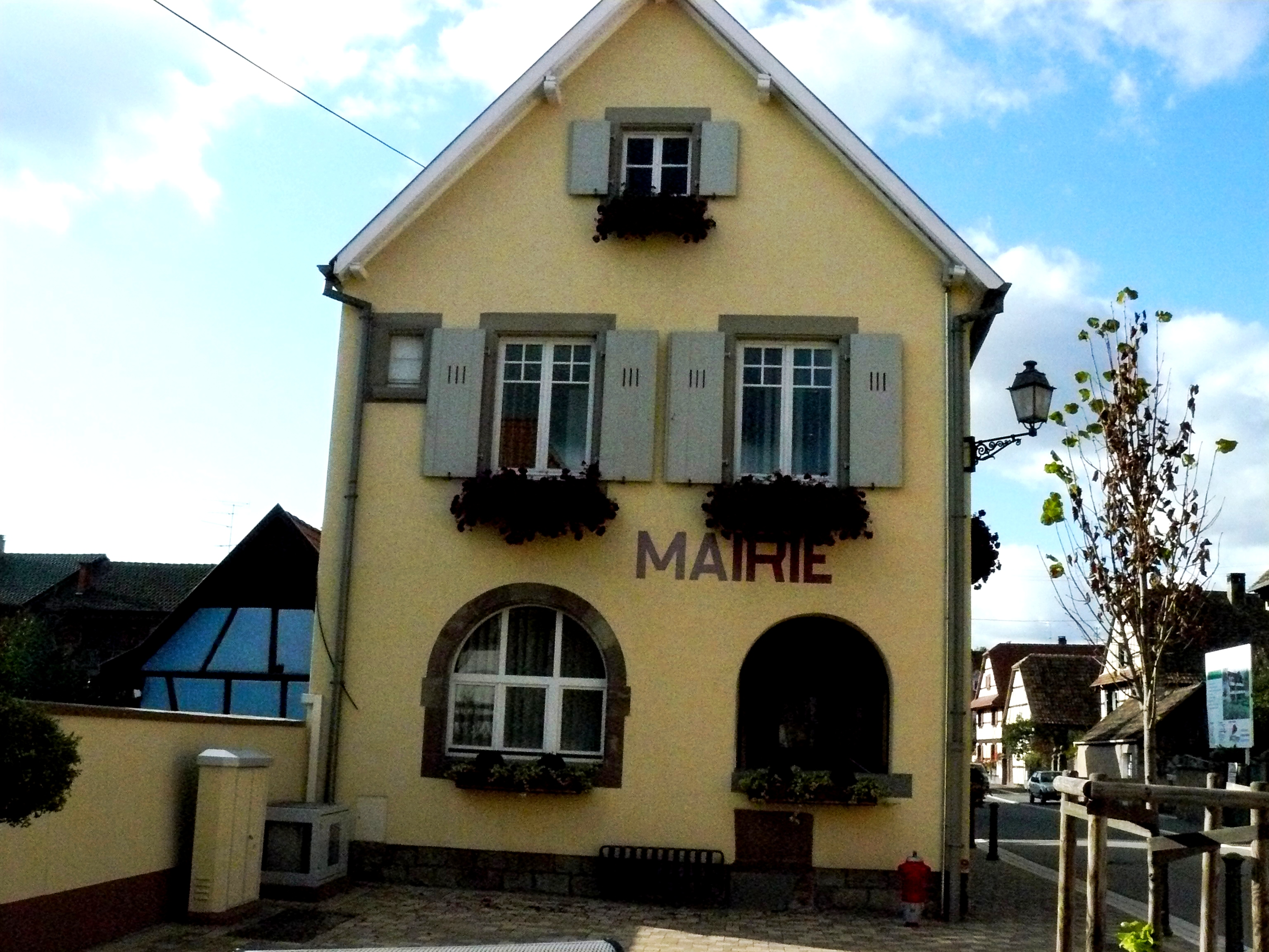 Mairie d'Ohnenheim